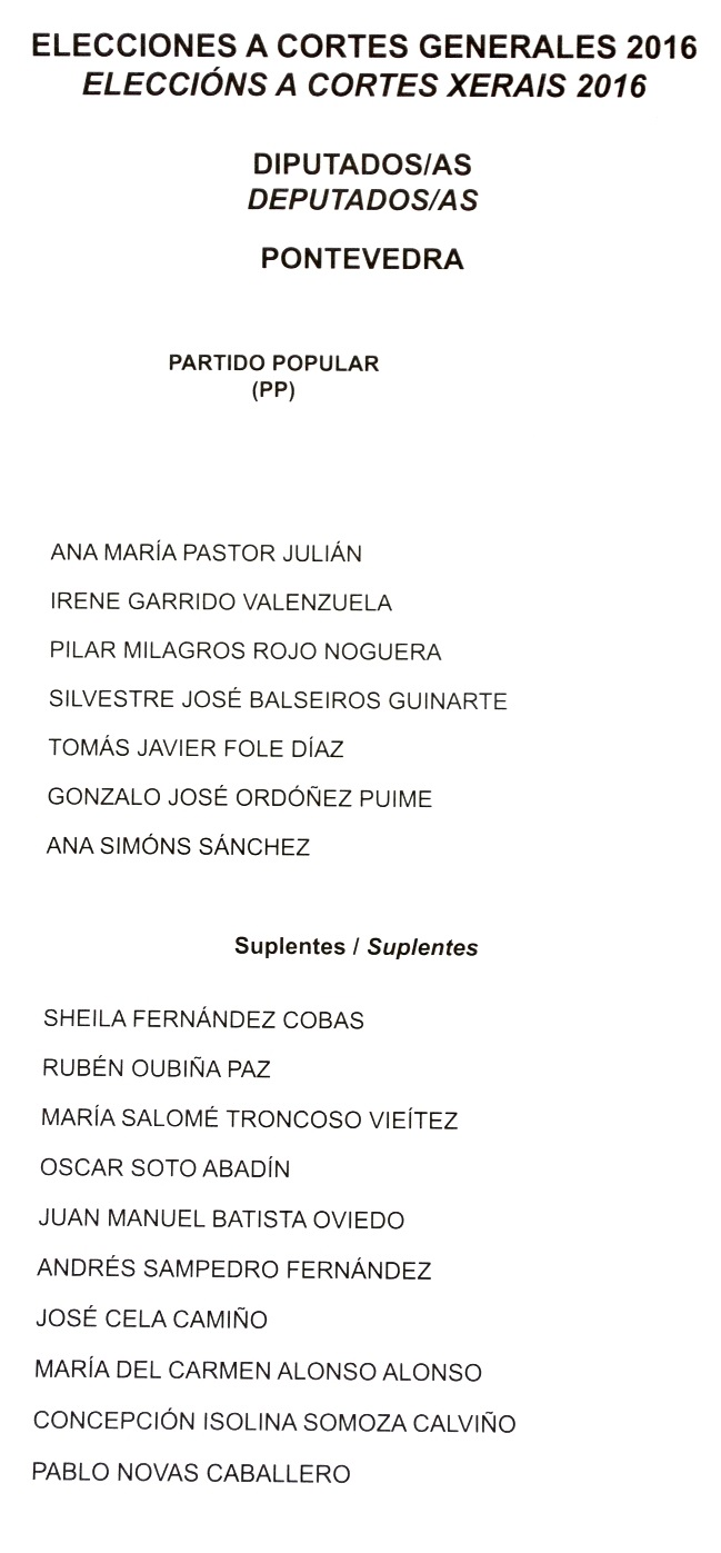 Papeletas electorales de las Elecciones a Cortes Generales de España de 2016, Provincia de Pontevedra.